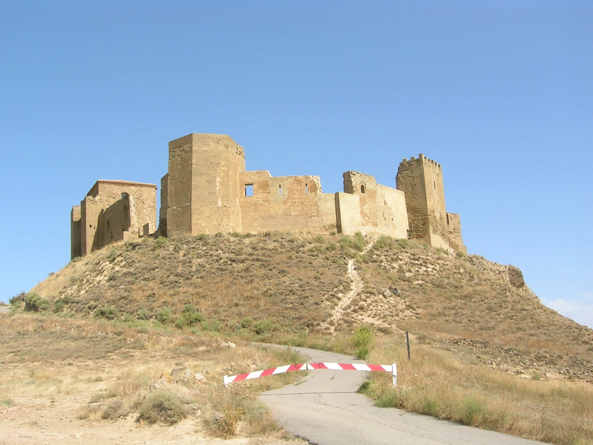 Castelo de Montearagón, comarca de Huesca, Espanha. Foto tirada por Sérgio Gomes.